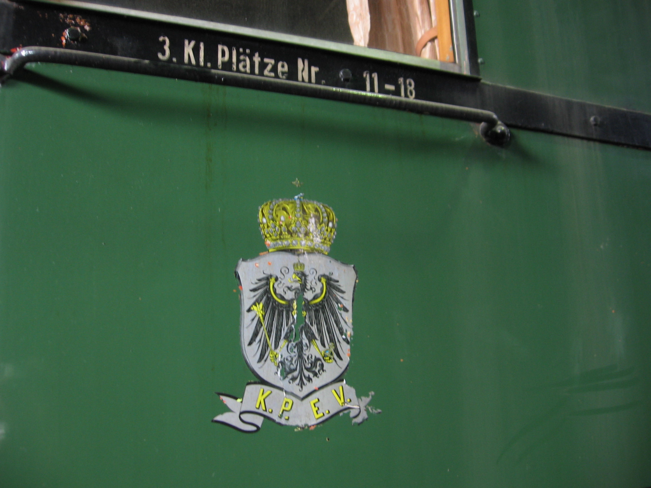 Teil eines Zuges im Verkehrsmuseum Dresden (Wappen der Preußischen Staatseisenbahnen).